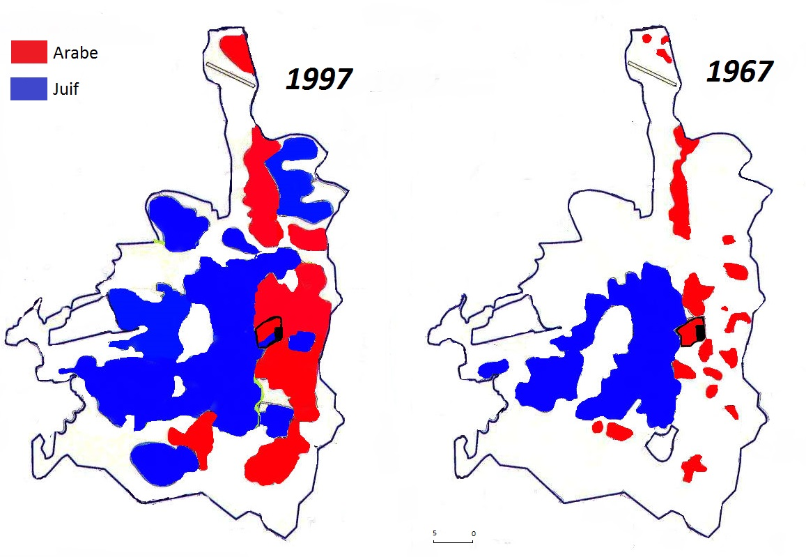 Comparaison entre la population juive et arabe de Jérusalem en 1967 et en 1997 ( selon le "Jerusalem Institute for Israeli Research").